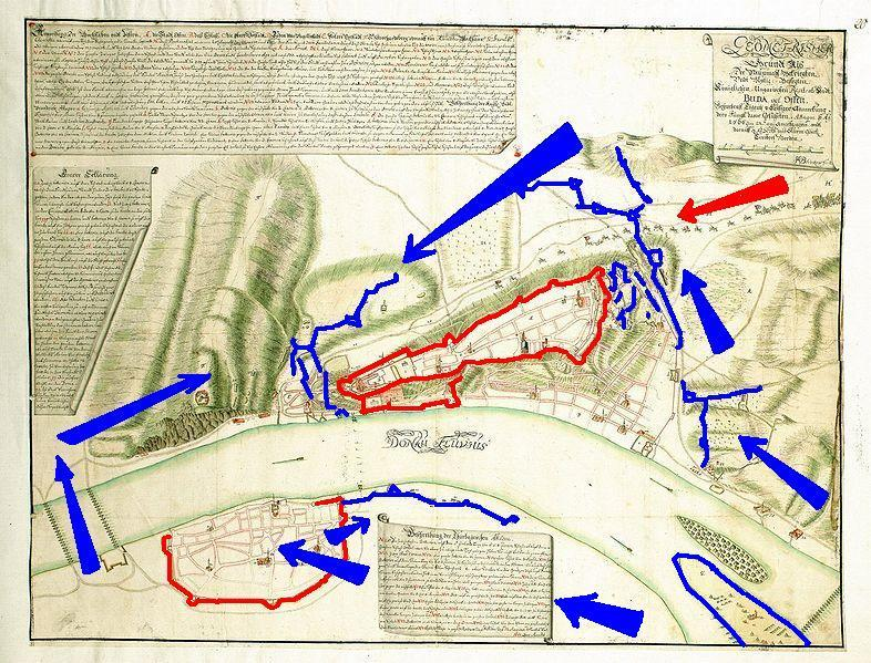 Buda visszavételének hadműveleti térképe